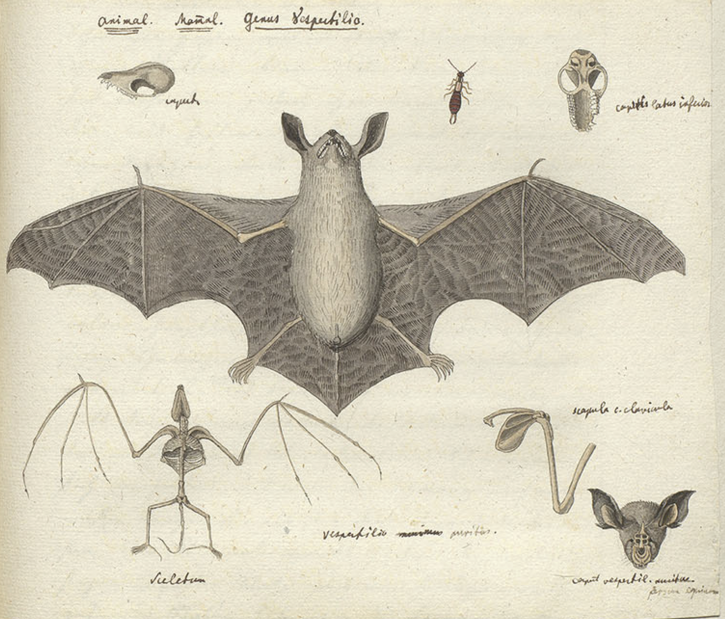 Wissenschaftliches Federaquarell